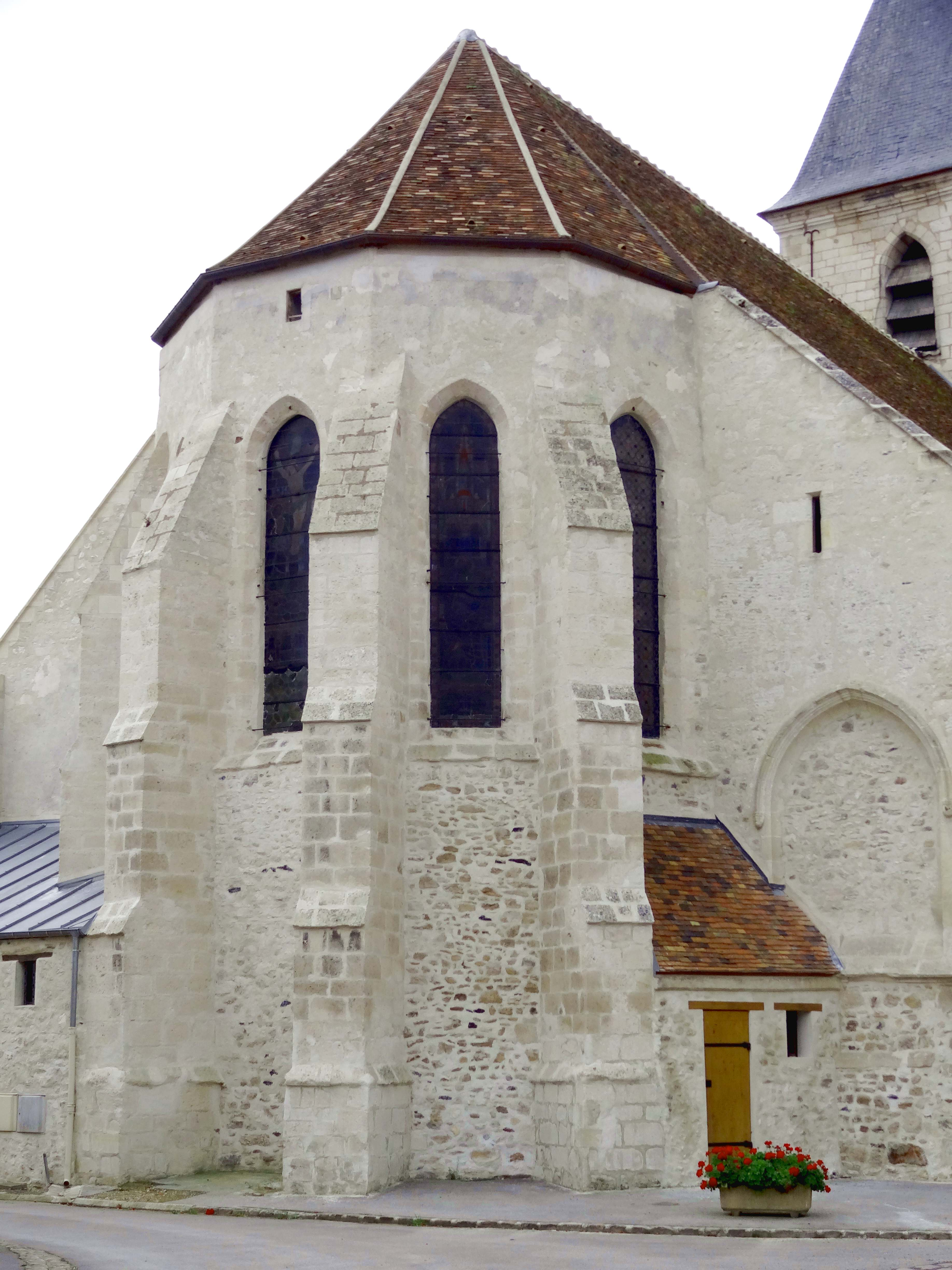 Église Saint-Pierre-et-Saint-Paul de Silly-le-Long - voir titre.